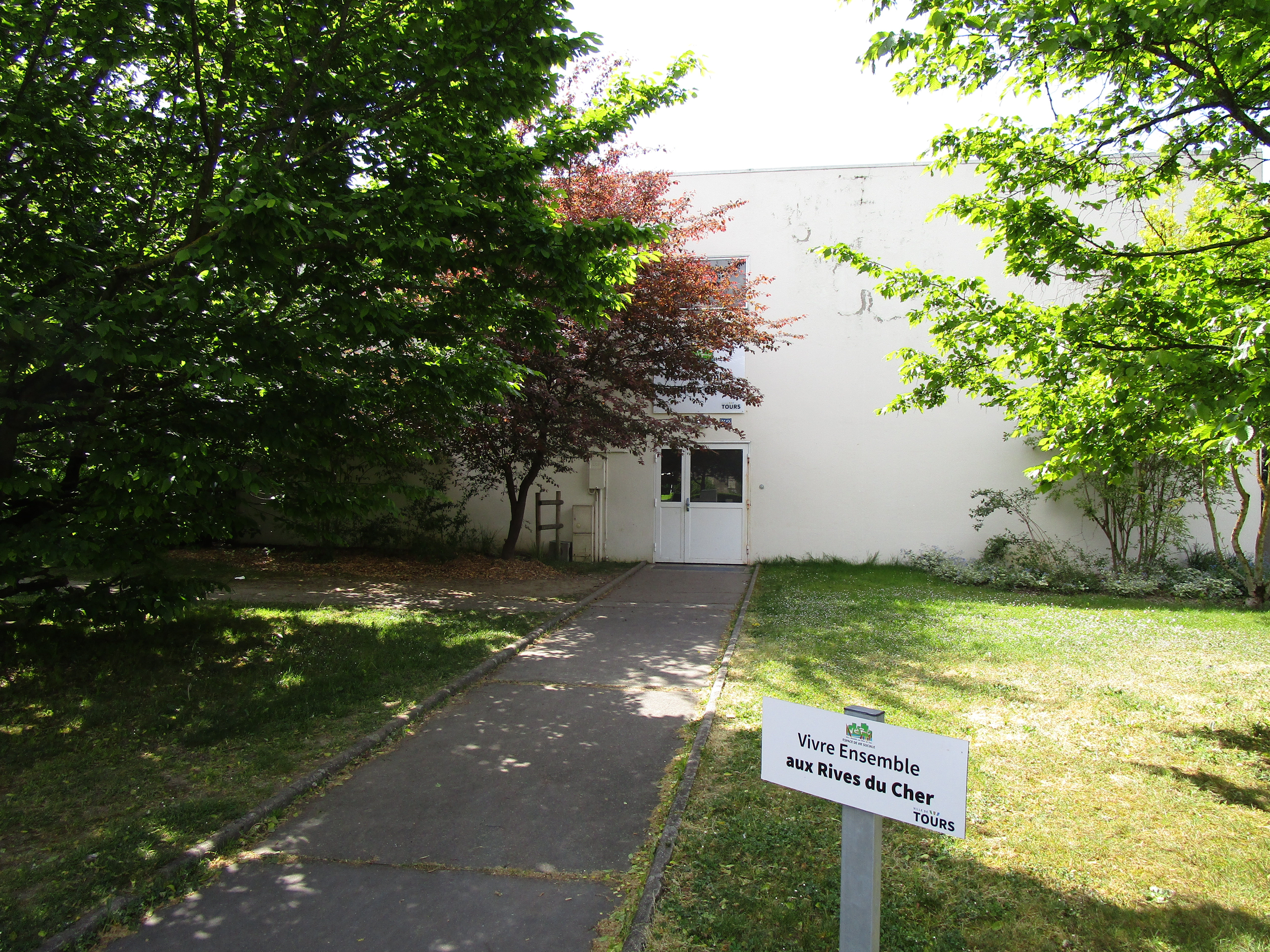 Les locaux de Vivre ensemble aux Rives du Cher, dans l'extrémité ouest du quartier du même nom, à Tours.